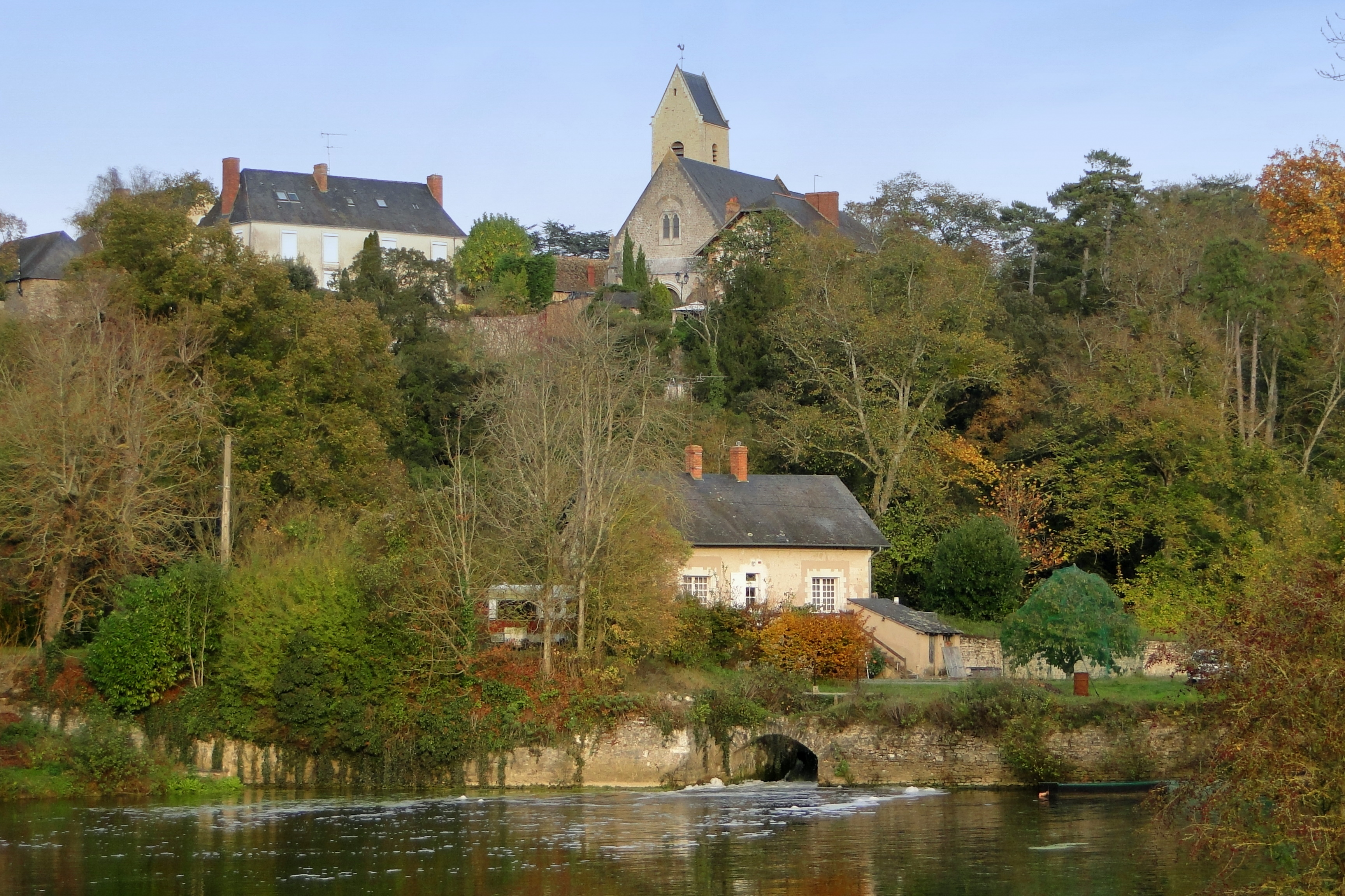 Vue générale de Juigné-sur-Sarthe